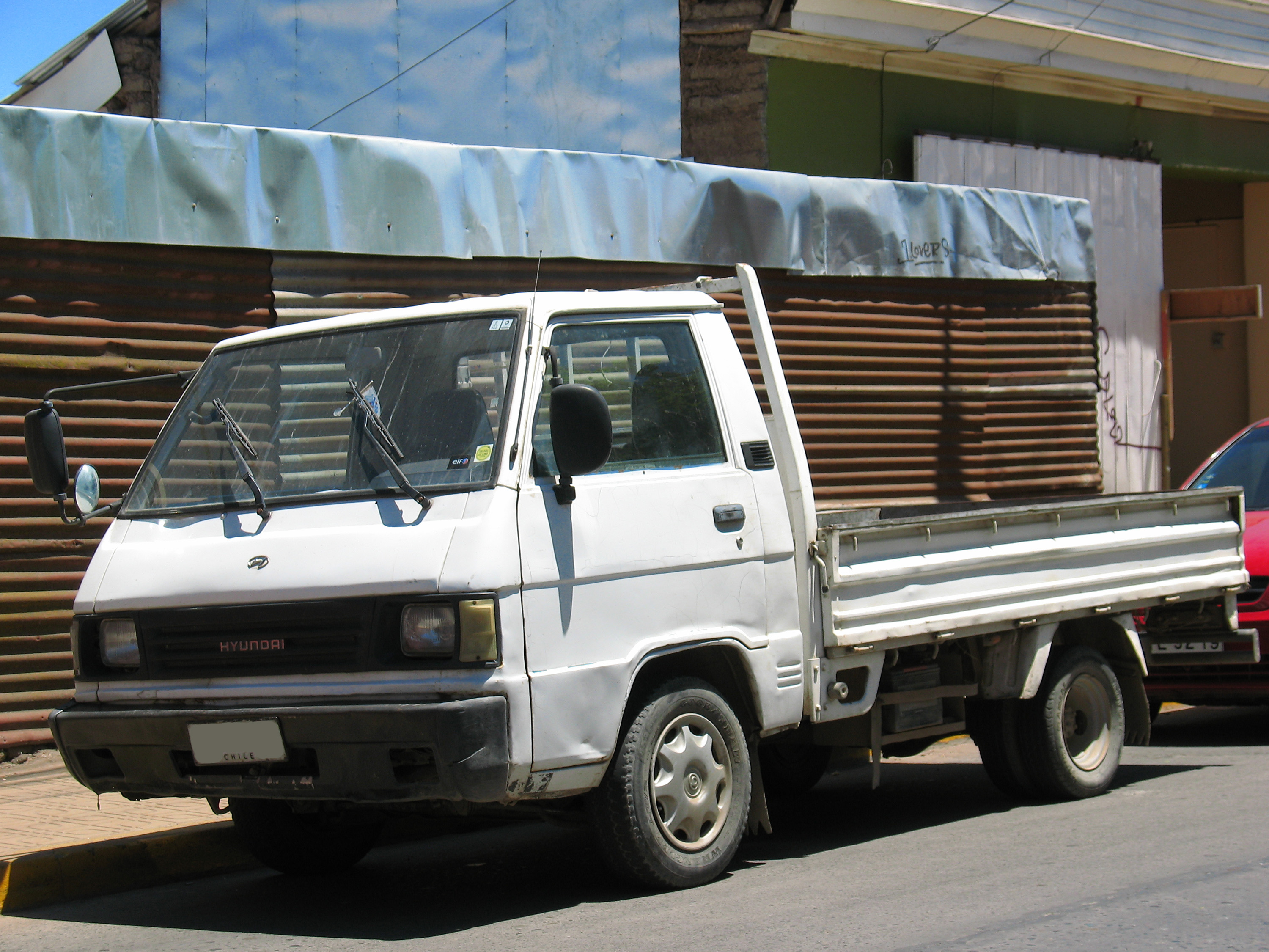 Hyundai Porter 2.5d 1992